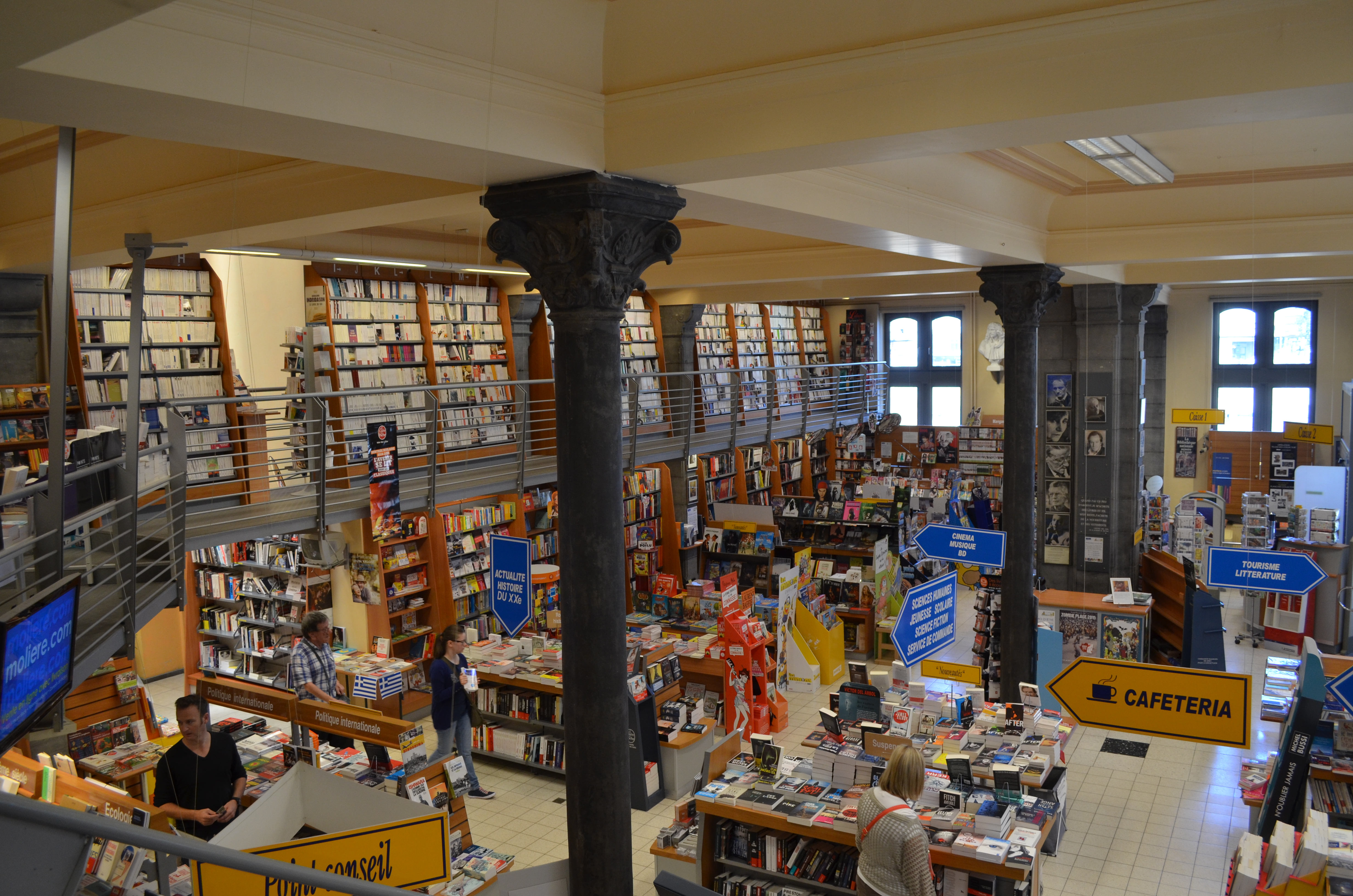 Ancien hôtel des Postes de Charleroi. Immeuble construit en 1907 dans le style néo-Renaissance flamande. Situé au boulevard Joseph Tirou, il fut classé en 1992 et abrite une librairie depuis 1996. Intérieur du rez-de-chaussée. Colonnes métalliques, poutrelles et charpente en bois réapparus lors des travaux d'aménagement de 1996.